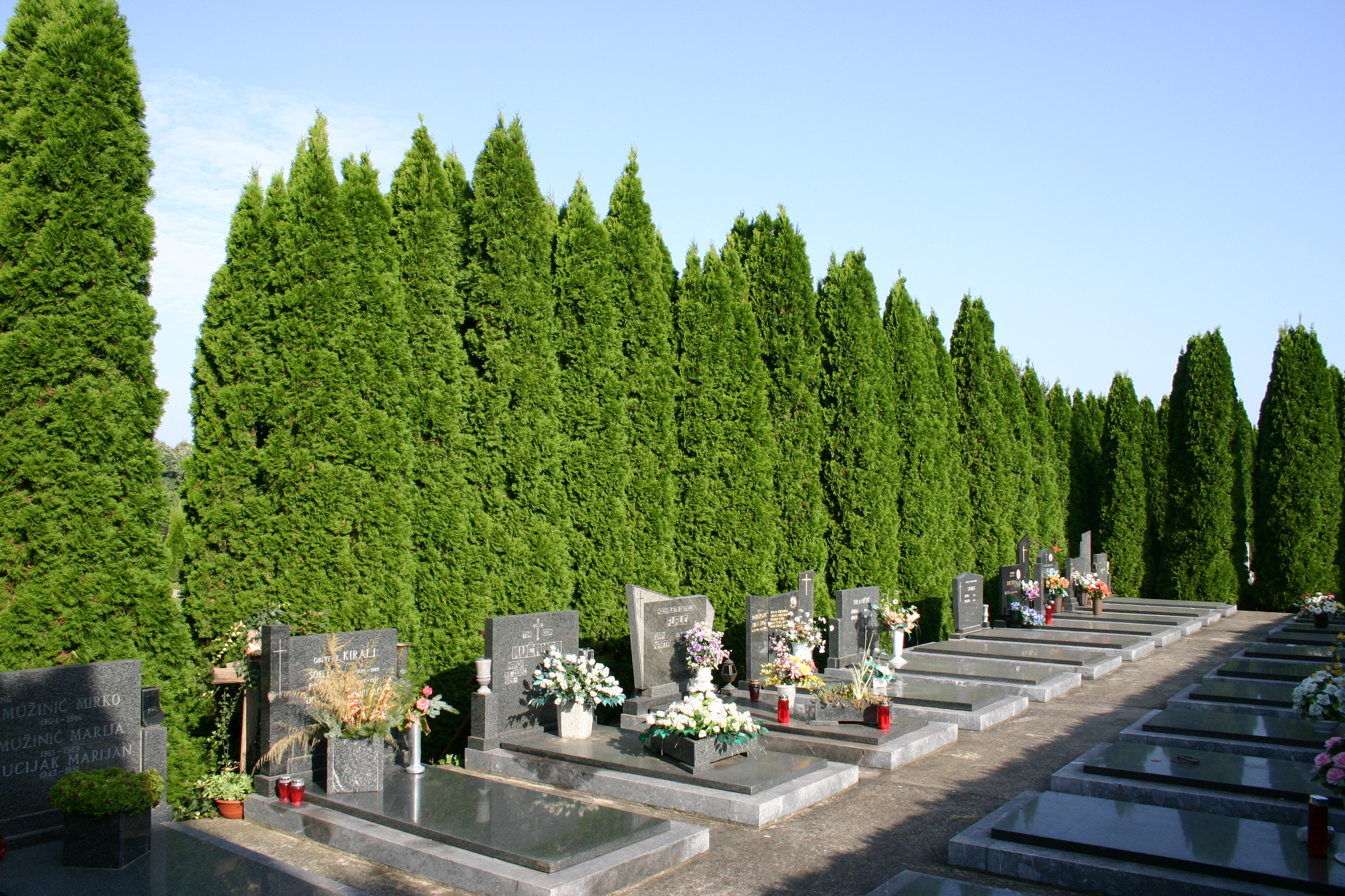 Prije potkornjaka